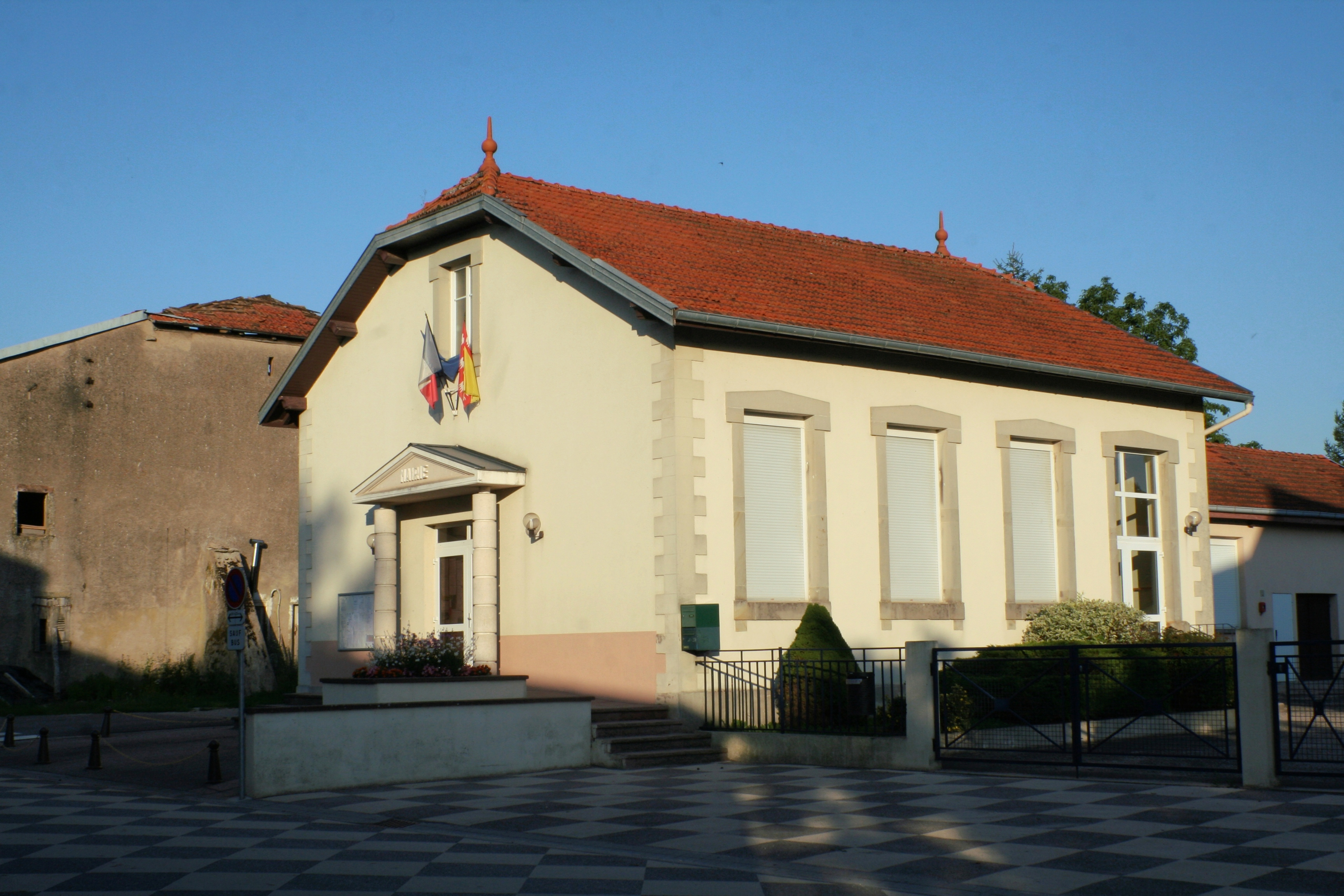 Mairie de Sainte-Hélène (Vosges)